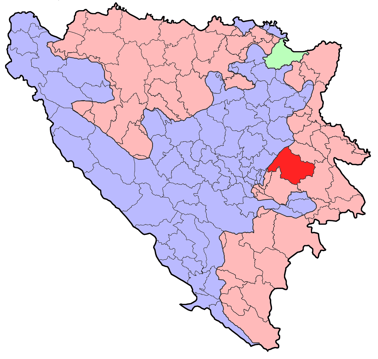 Prikaz općine Sokolac u Bosni i Hercegovini